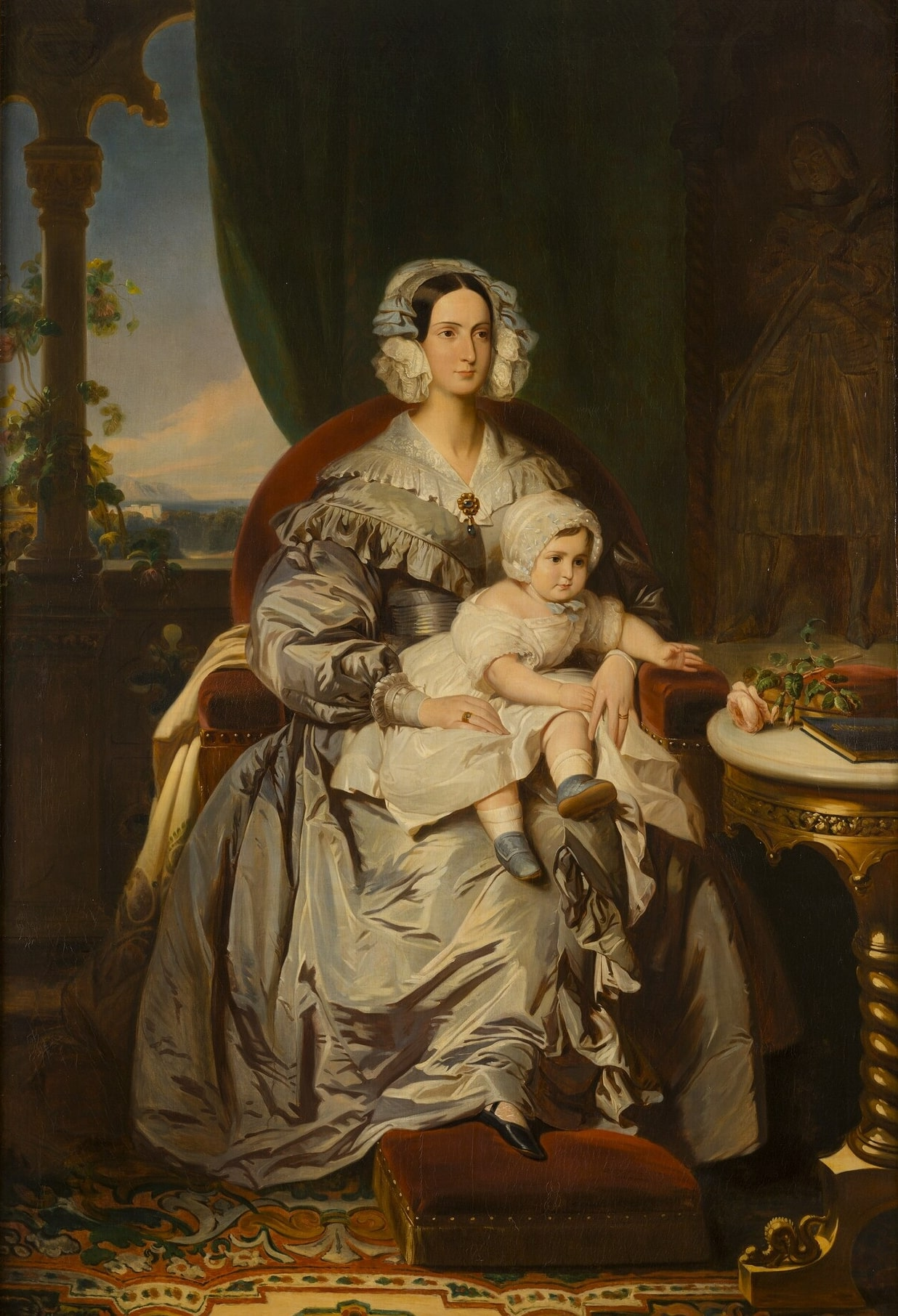 Portrait de Marie d'Orléans, duchesse de Wurtemberg (1813-1839), tenant sur ses genoux son fils Philippe dans les langes